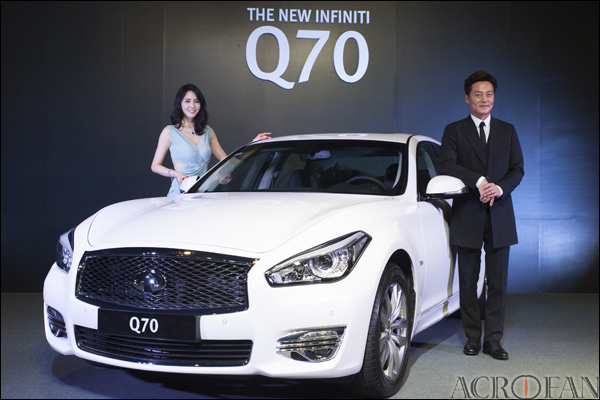 더 뉴 인피니티 Q70 출시 기념 포토 세션